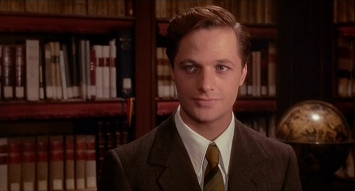 Lino Capolicchio in Il giardino dei Finzi Contini, film del 1970 diretto da Vittorio De Sica